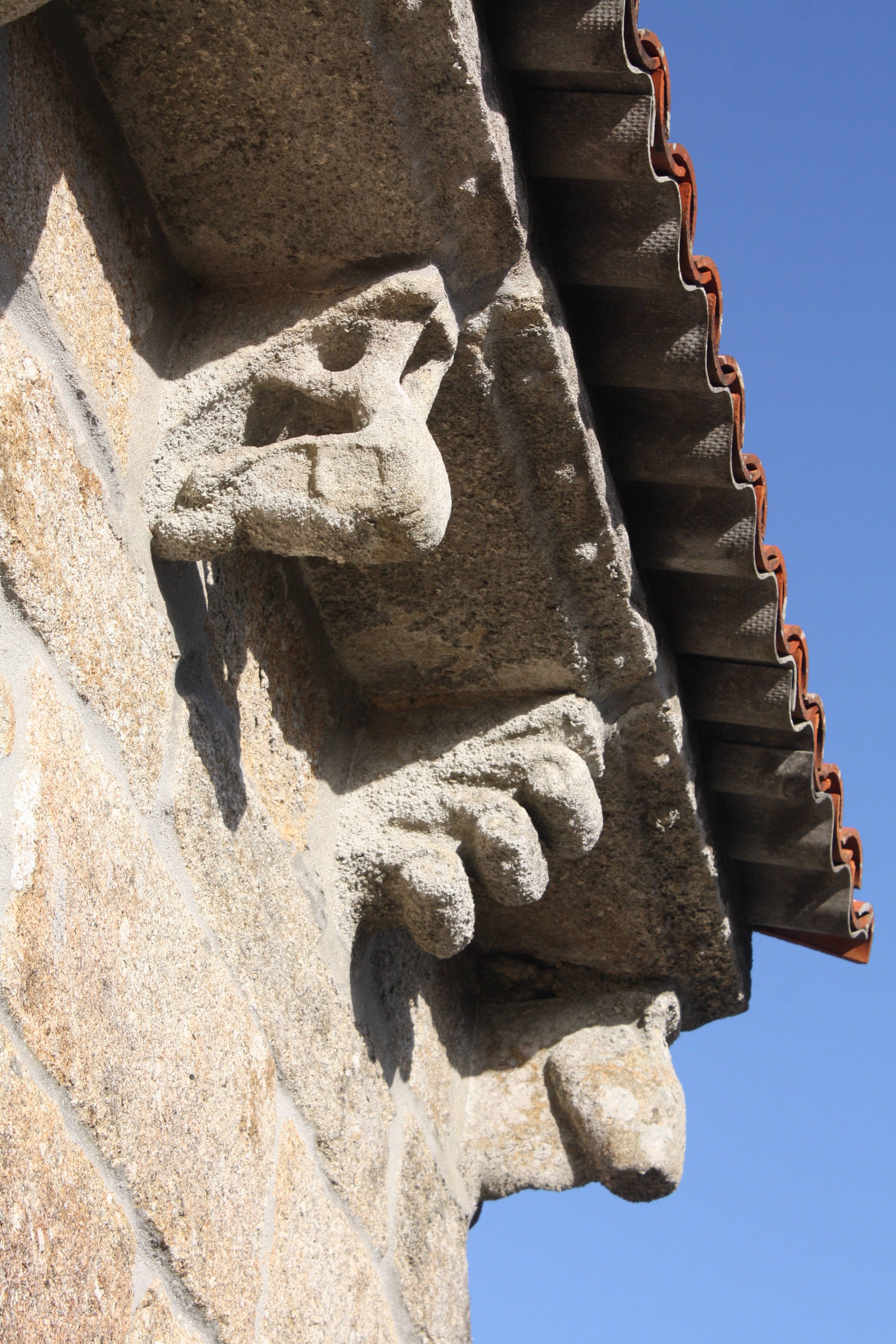 Detalle dos canzorros da igrexa de San Pedro de Fontecarmoa, Vilagarcía de Arousa (Pontevedra)